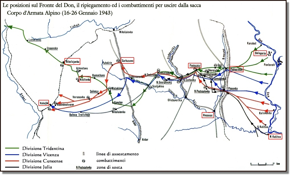 Schema sommario delle vie di ritirata del Corpo alpino dopo l'offensiva Ostrogorzk-Rossoš